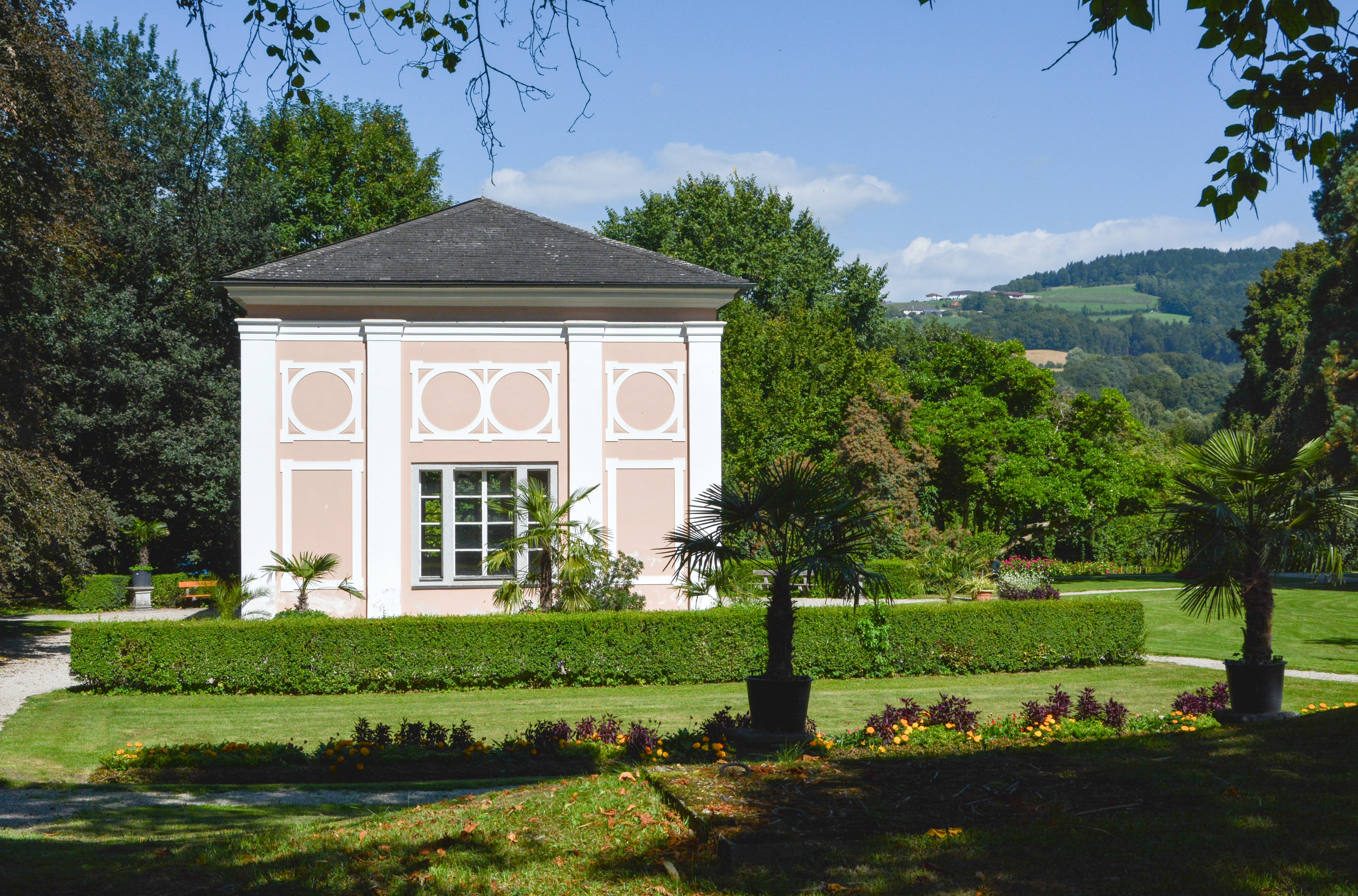 Gesamtanlage Zisterzienserkloster Wilhering, Gartenpavillon